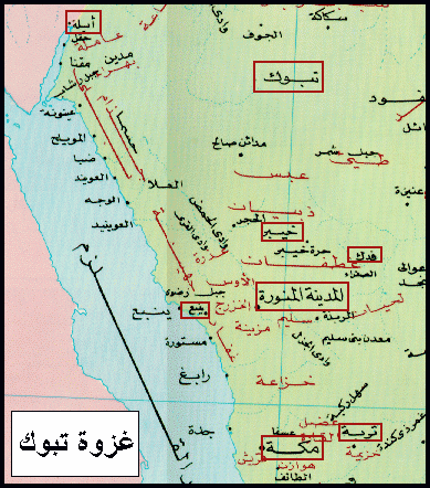 خريطة لموقع غزوة تبوك